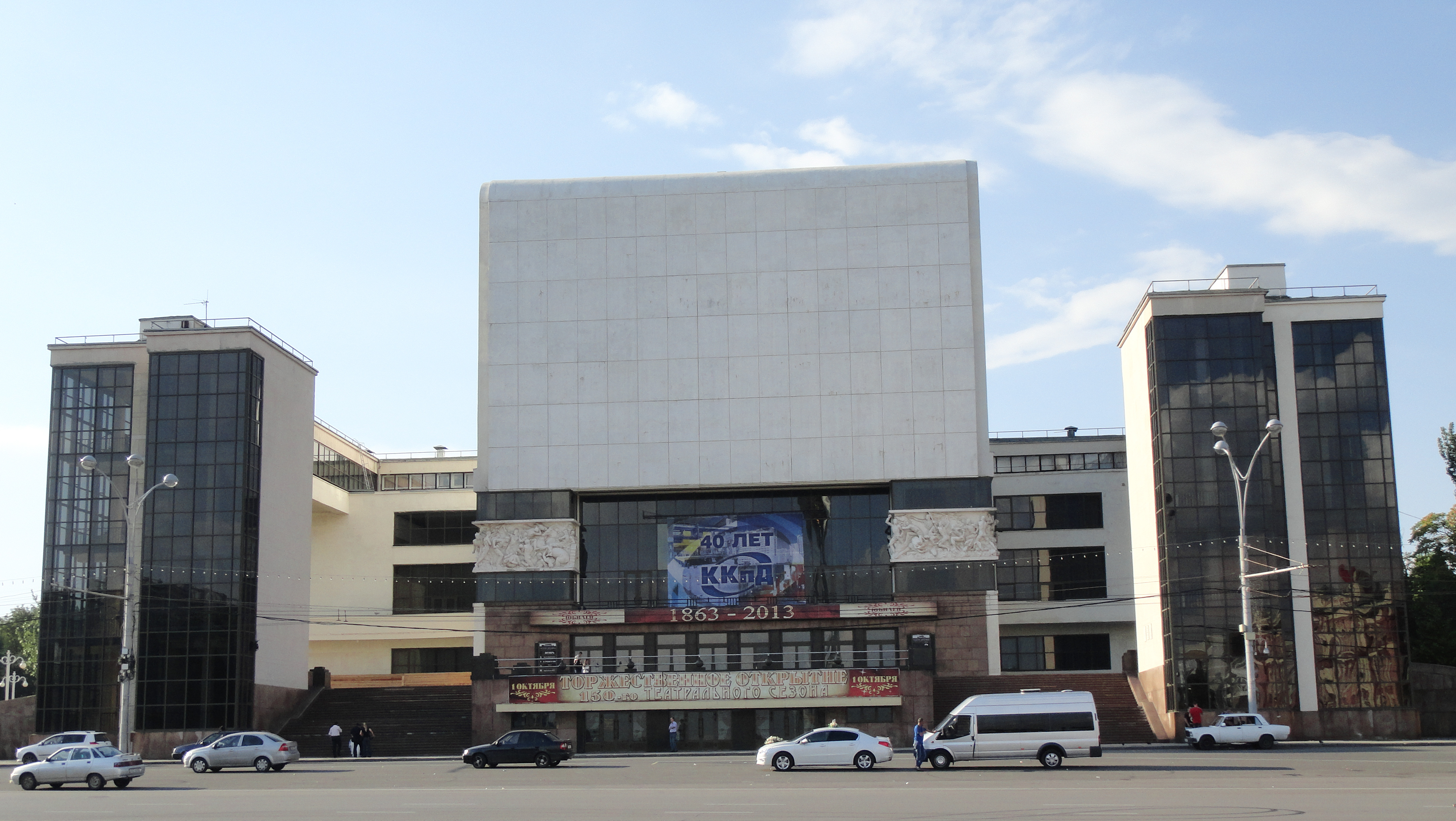 Здание Ростовского Государственного драматического театра им. М. Горького (театр) (Ростовская область, Ростов-на-Дону, Театральная площадь, 1)